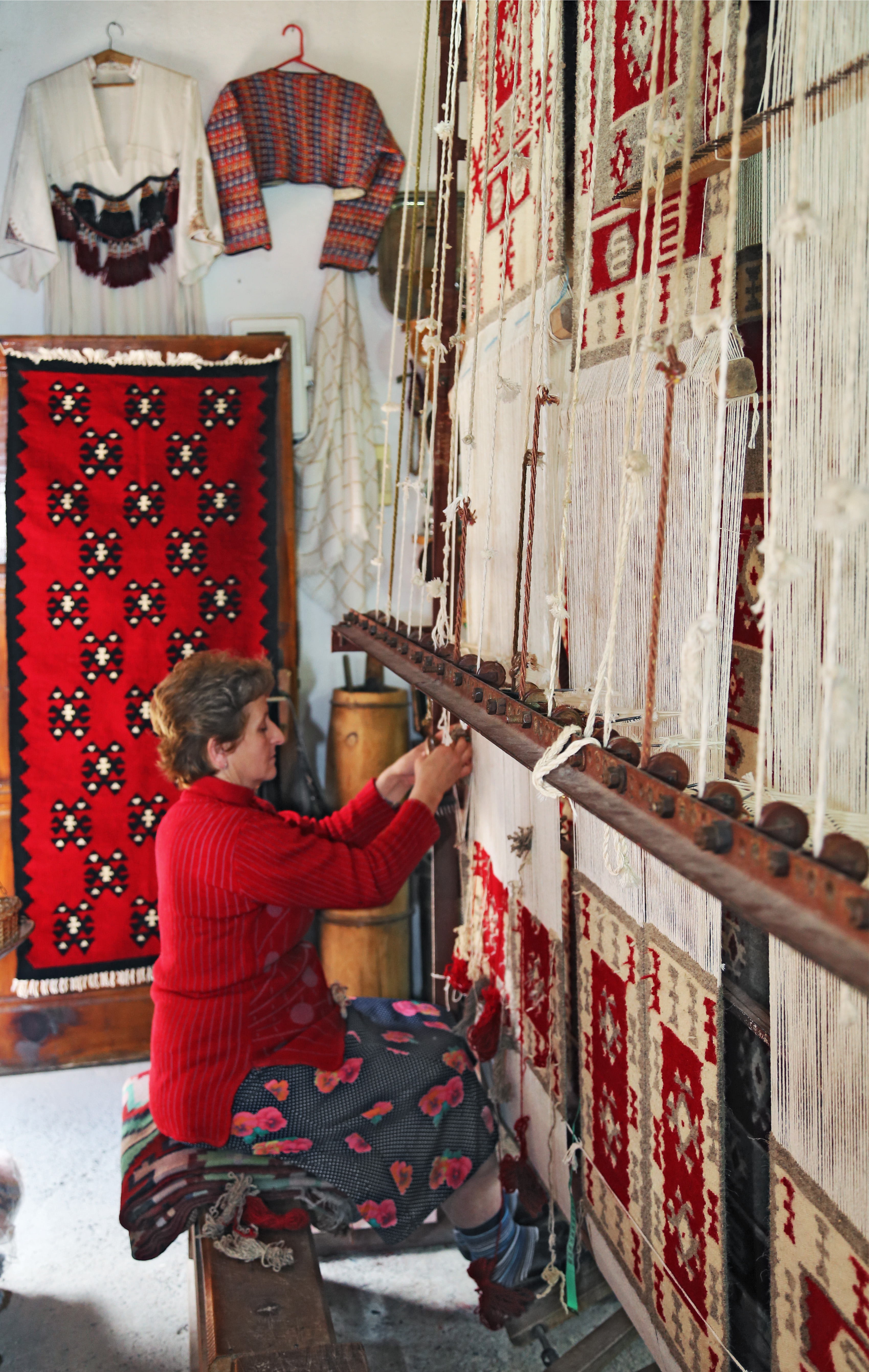 Pazari I Vjeter